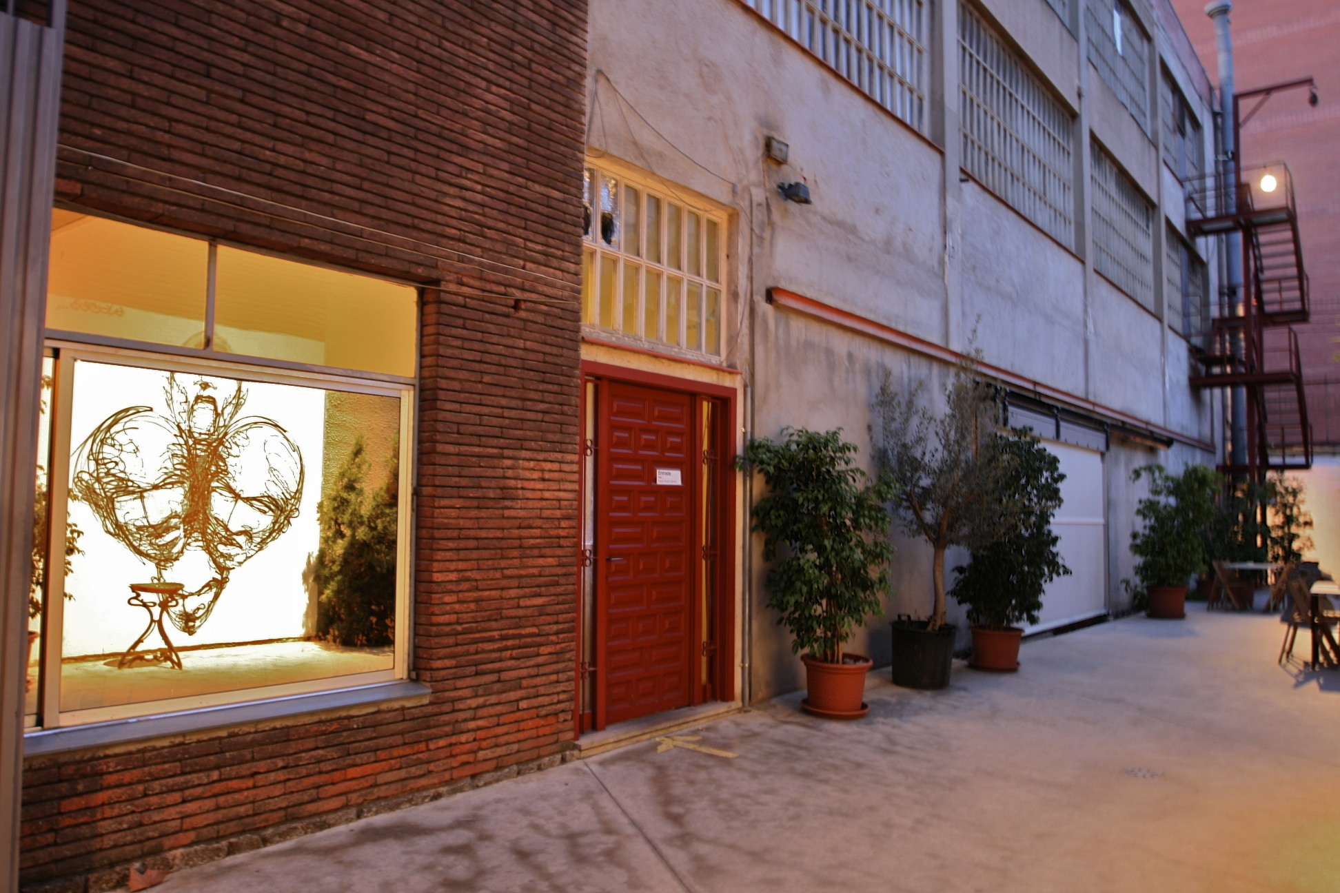 Pati de la Nau Ivanow